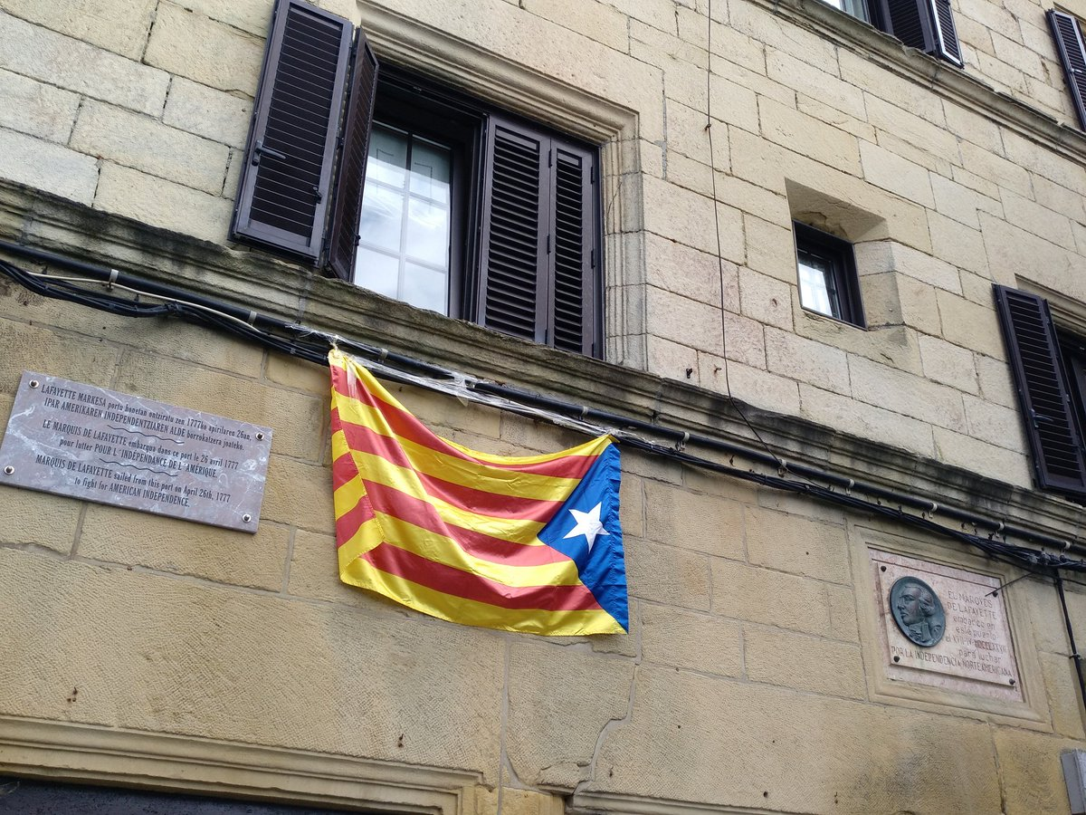 Lafayettek Ipar Amerikarako bidean geldialdia egin zuen Pasaian. AEBen independentzia gerran parte hartu zuen. Hori gogoratzen duen irudi eta plaka daude Donibanen.